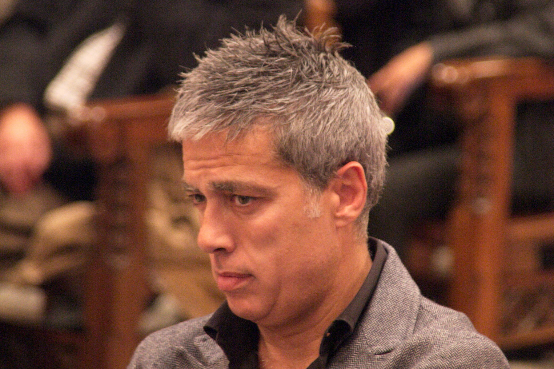 Albert Om a l'Acte de lliurament a Neus Català de la medalla d'Or al Mèrit Cívic de l'Ajuntament de Barcelona. 29-10-2014